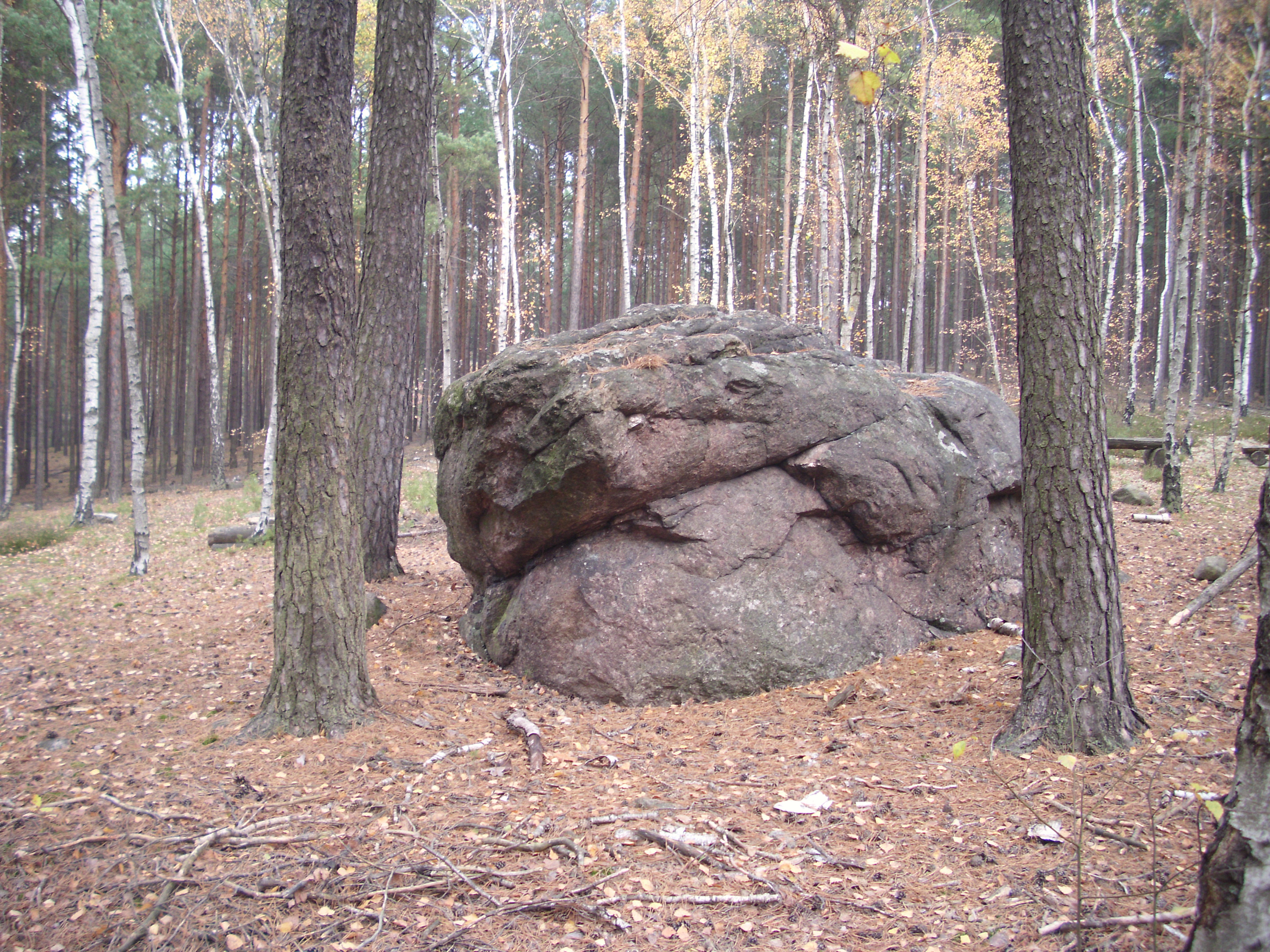 Teufelsstein im Naturschutzgebiet Klautzkesee und Waldmoore mit Kobbelke, Naturpark Schlaubetal, Brandenburg